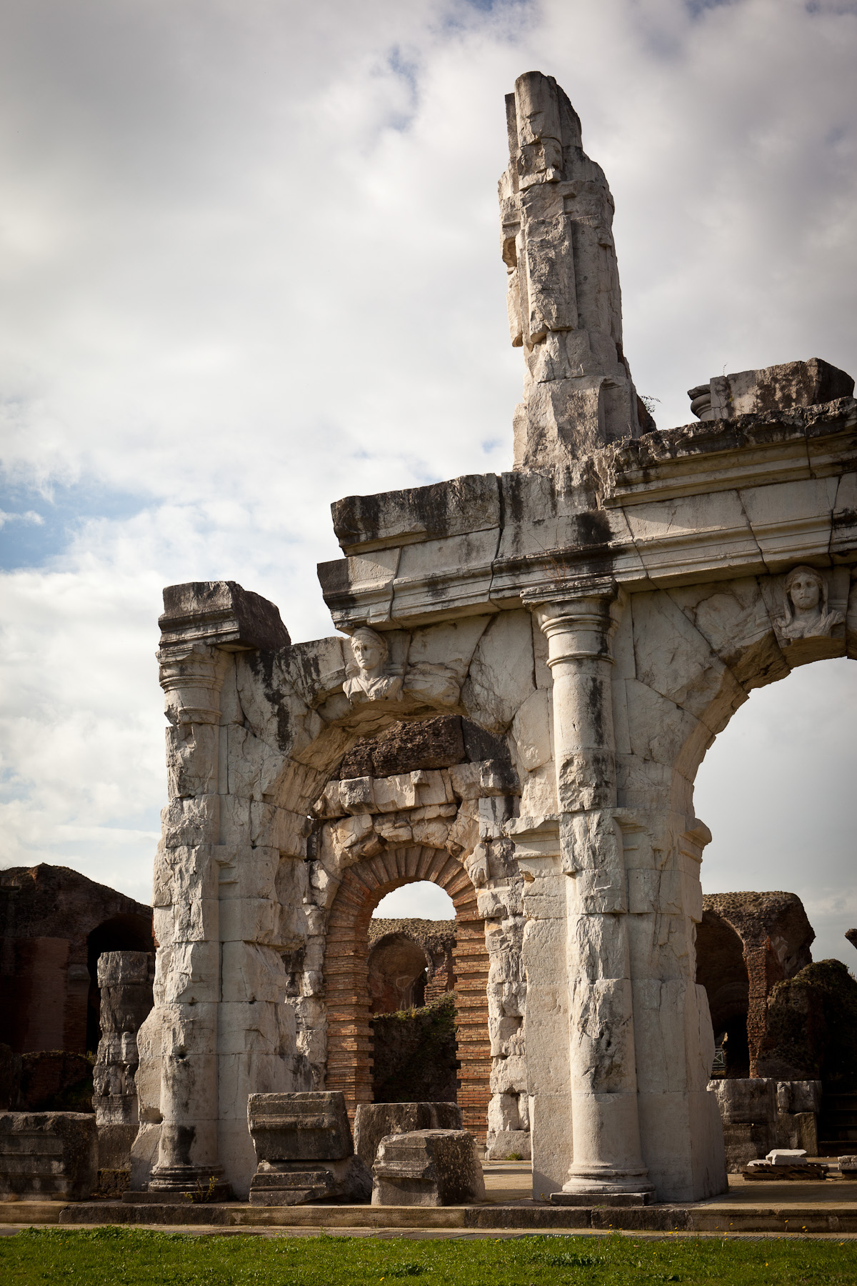 Capua